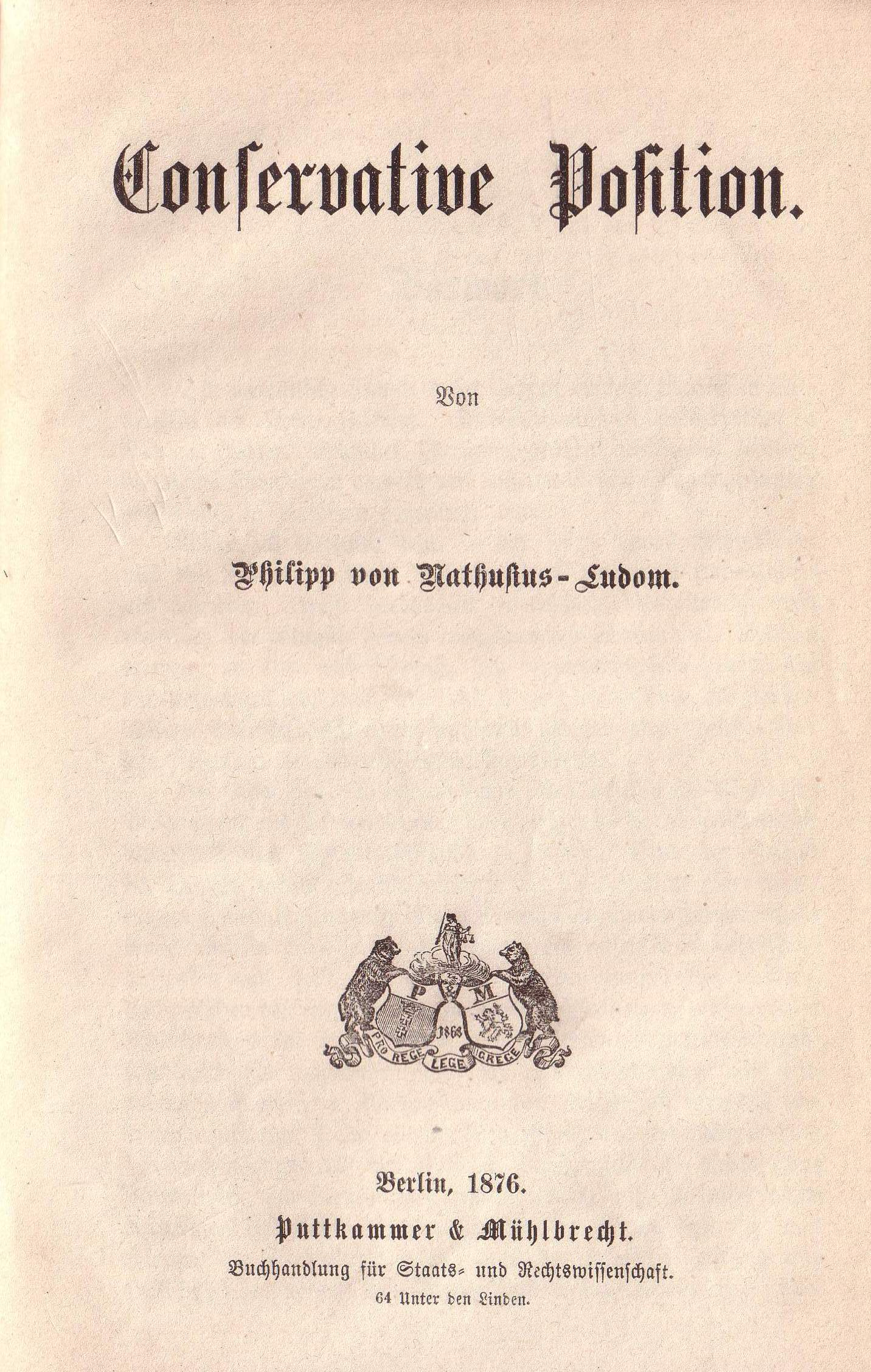 Philipp von nathusius Ludon, veröffentlichung